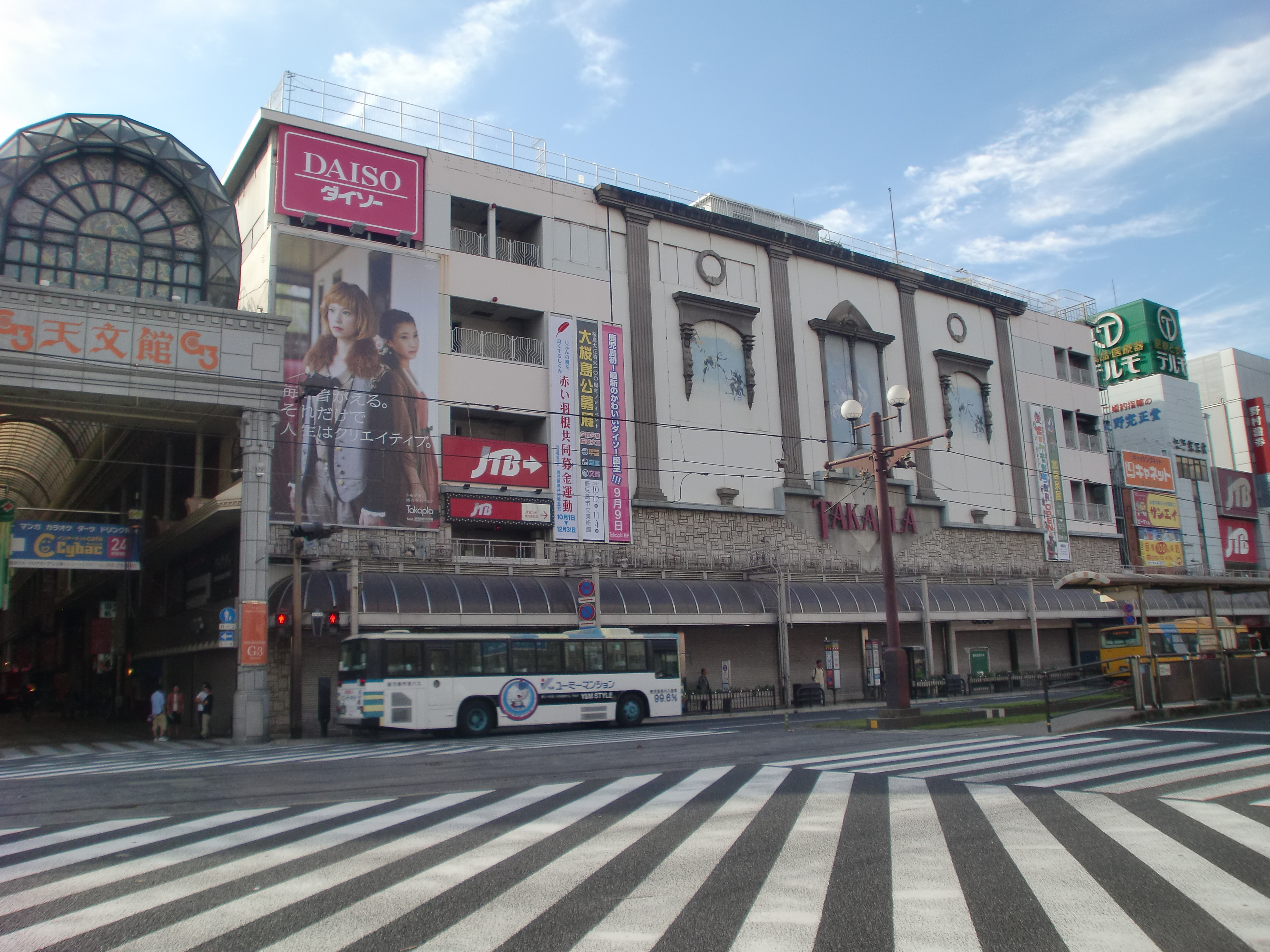 タカプラ（運営：高島屋開発）の外観。